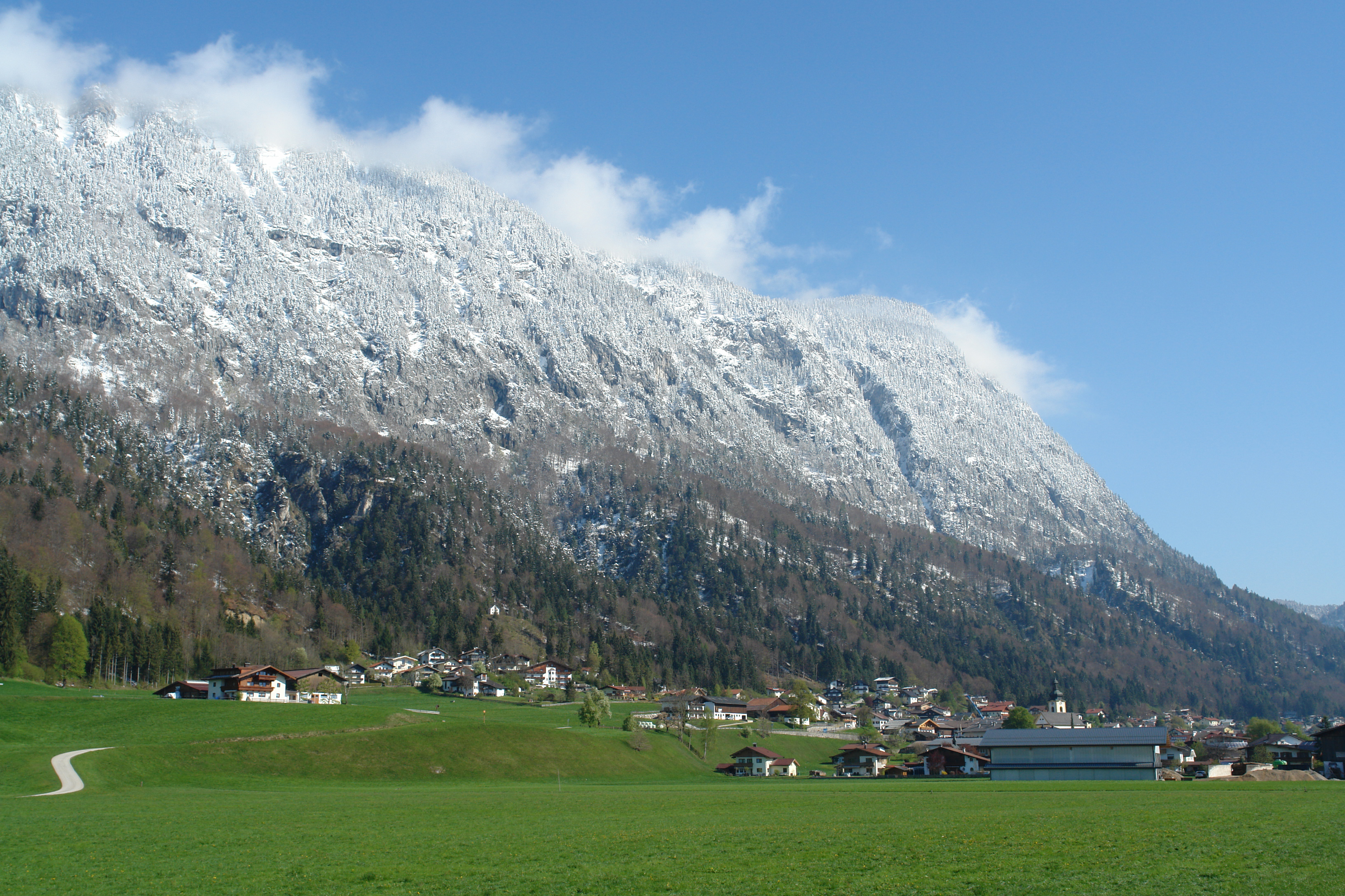 Langkampfen mit Pendling